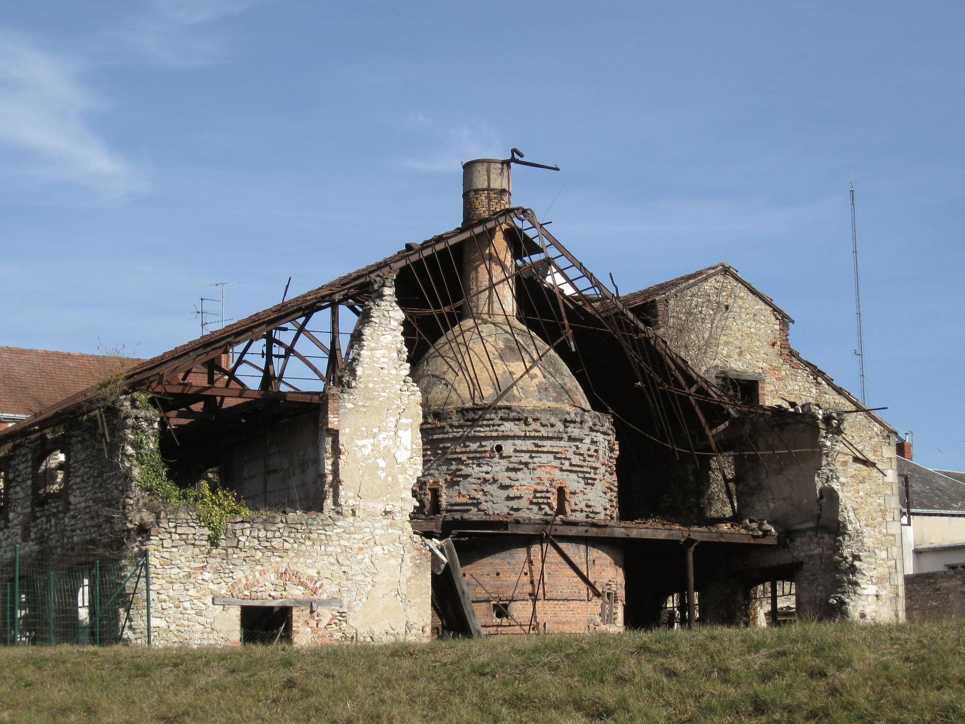 Bâtiment abritant un four rond à globe de l'ancienne fabrique de porcelaine Gaucher, Vierzon, Cher, France.